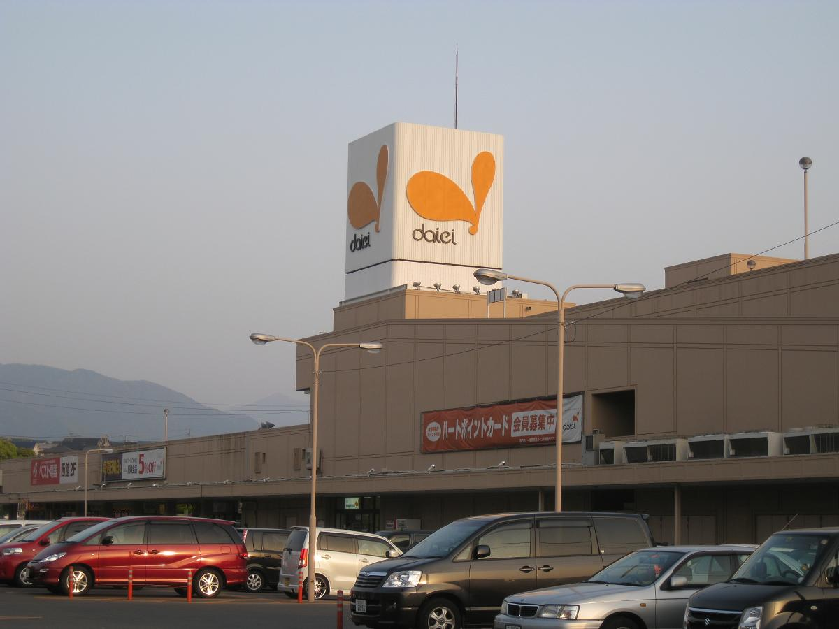 ダイエーショッパーズモールなかま東館（旧、ダイエー中間店）